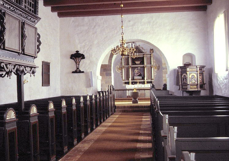 Vindum Kirke, Viborg Kommune, kirkerummet